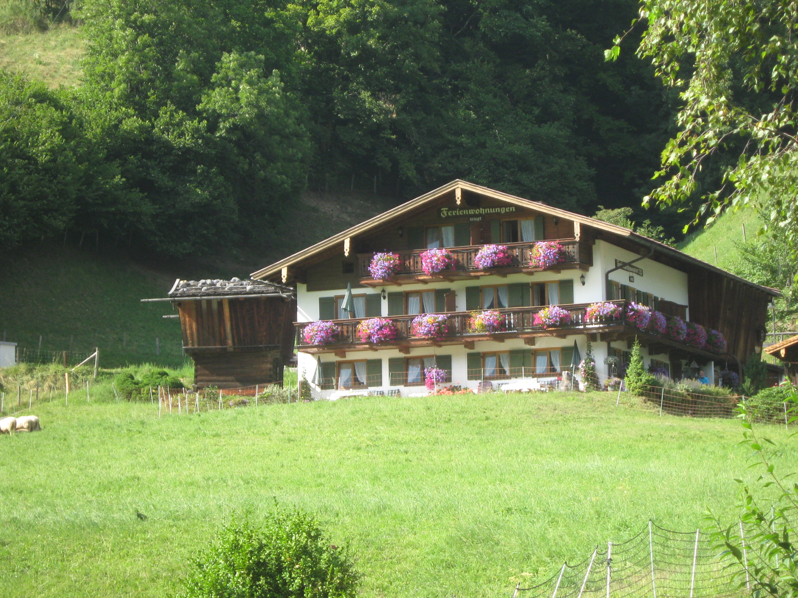 Anwesen Kaspern, Gnotschaft Schwarzeck, Gemeinde Ramsau bei Berchtesgaden (Holzengasse 9), früher am Mayrlehen zum Caspar (Gaspern), links (nördlich) oberhalb der Ramsauer Ache, links (westlich) des Kasperngrabens, der hier die Grenze zur Gnotschaft Au darstellt